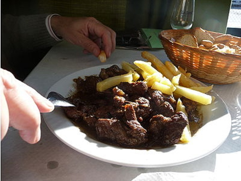 Civet de sanglier en Espagne